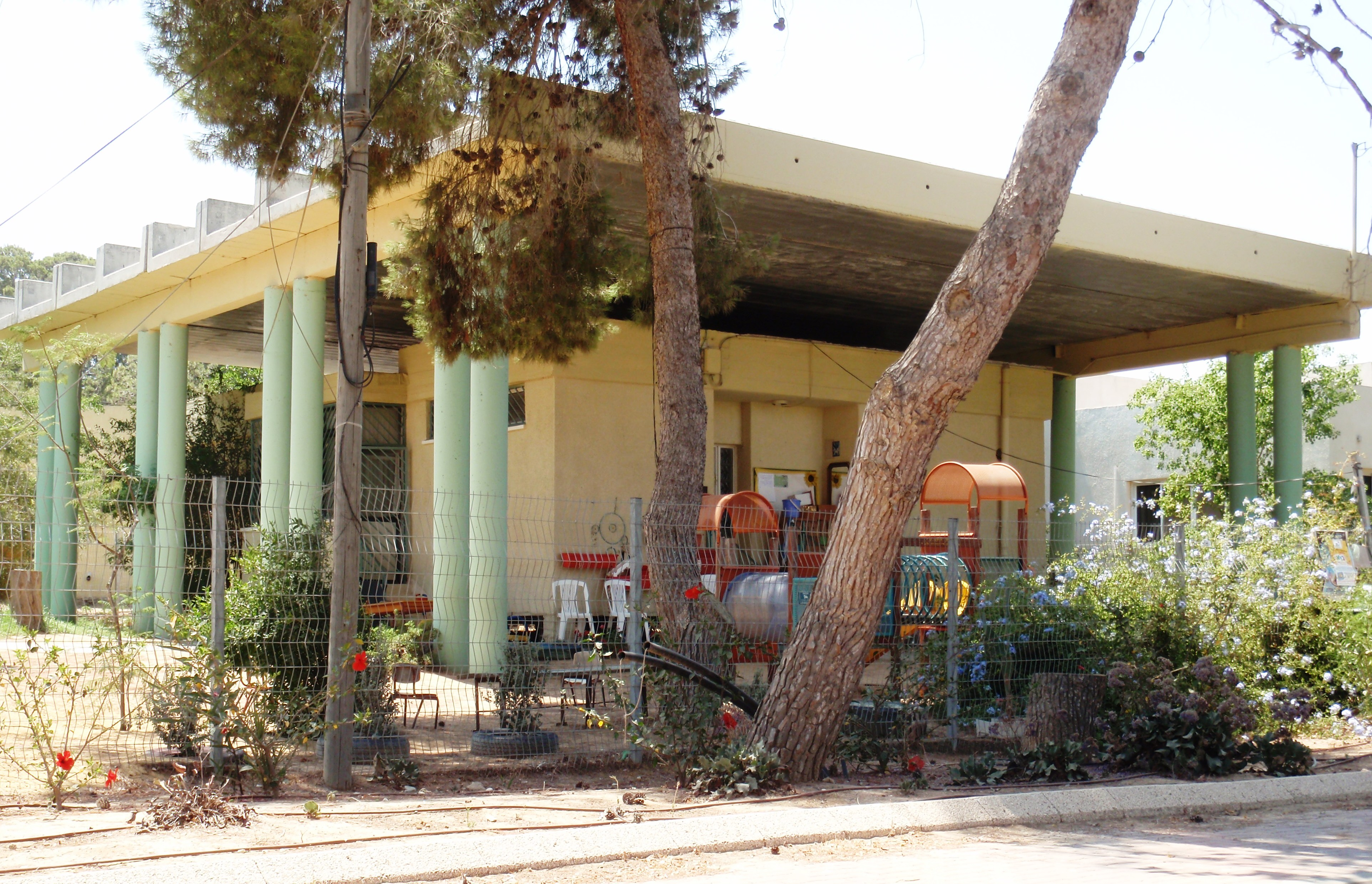 Moshavim תקומה גן ילדים ממוגן מפני קאסאמים